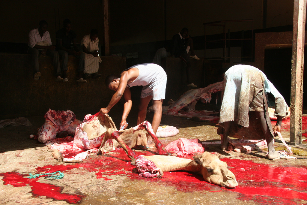 Camel slaughtering in Mauritania